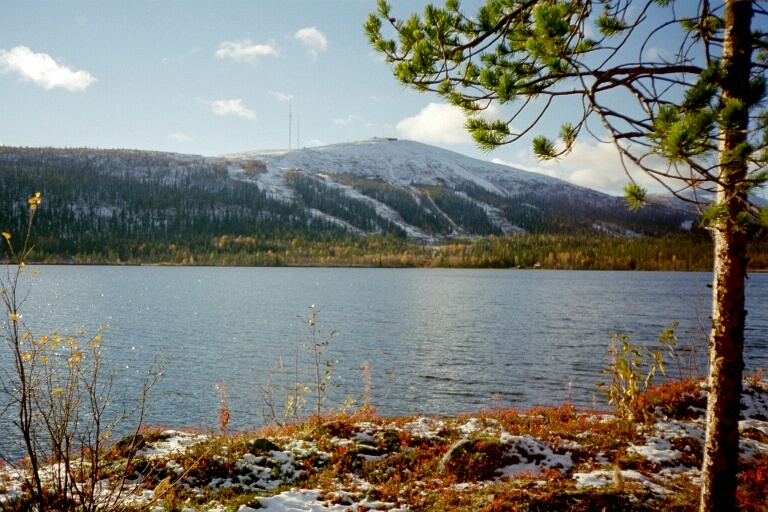 Dundret sett från Harrträsk Foto:Vinterfrid 2 februari 2005 kl.02.21 Vinterfrid 768x512 (361685 bytes) (Dundret)